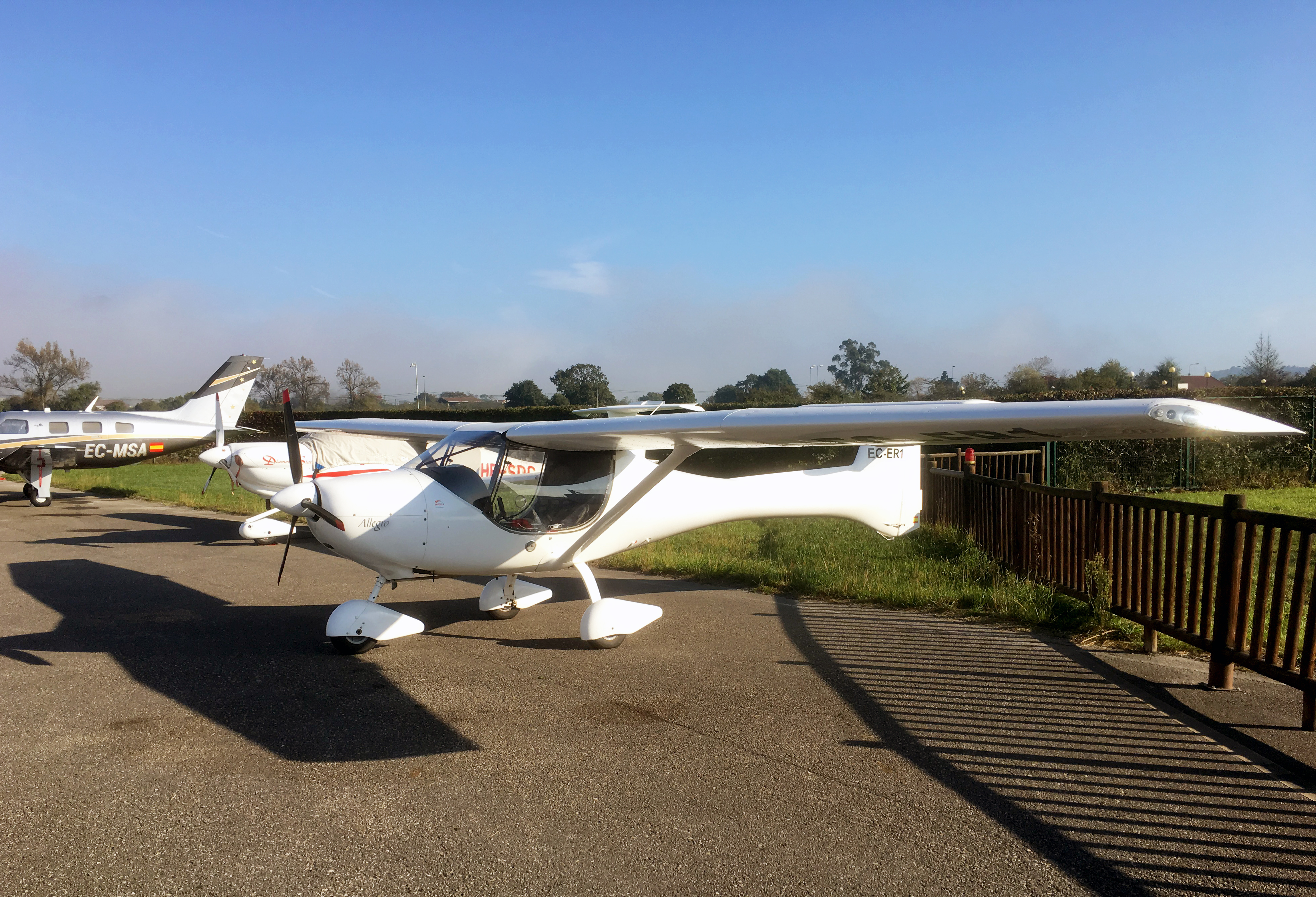 Aeródromo de La Morgal, Aeródromu, aeropuertu, Asturias, Asturies. Llanera